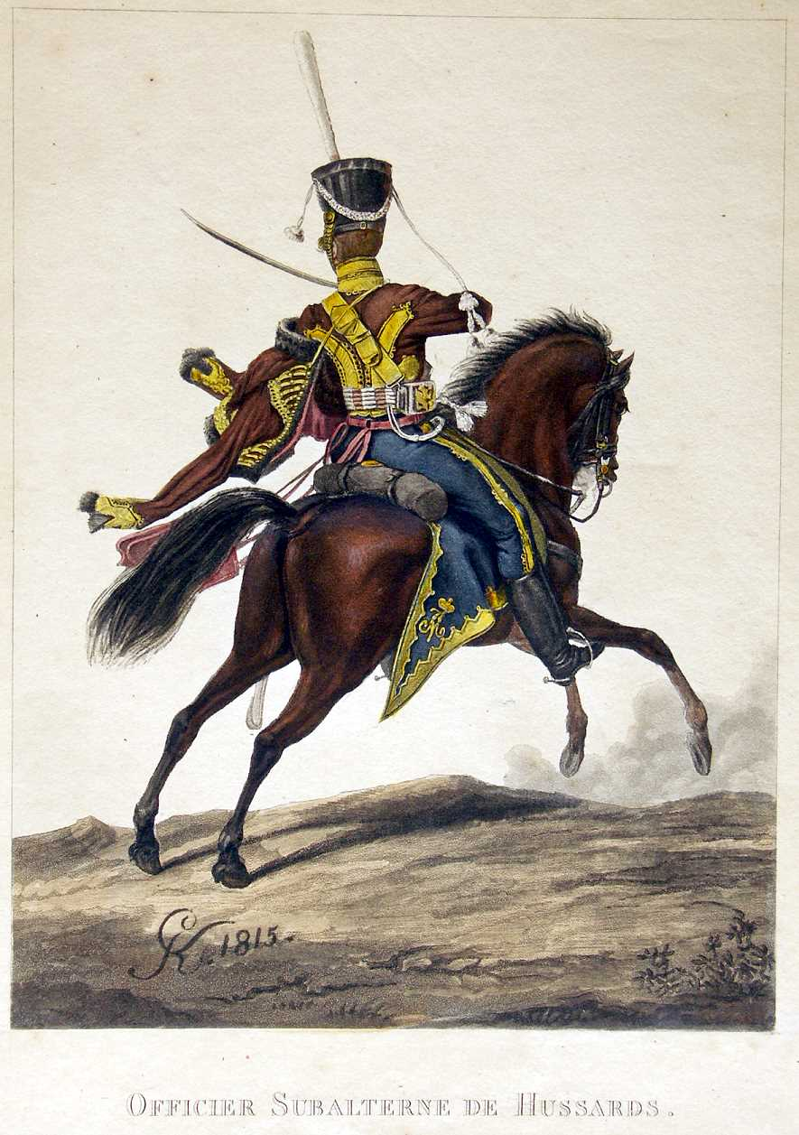 Обер-офицер Гусарских полков (12-ый гусарский Ахтырский генерала Дениса Давыдова, Ея Императорского Высочества Великой Княгини Ольги Александровны полк / Ахтырский 12-й гусарский полк).